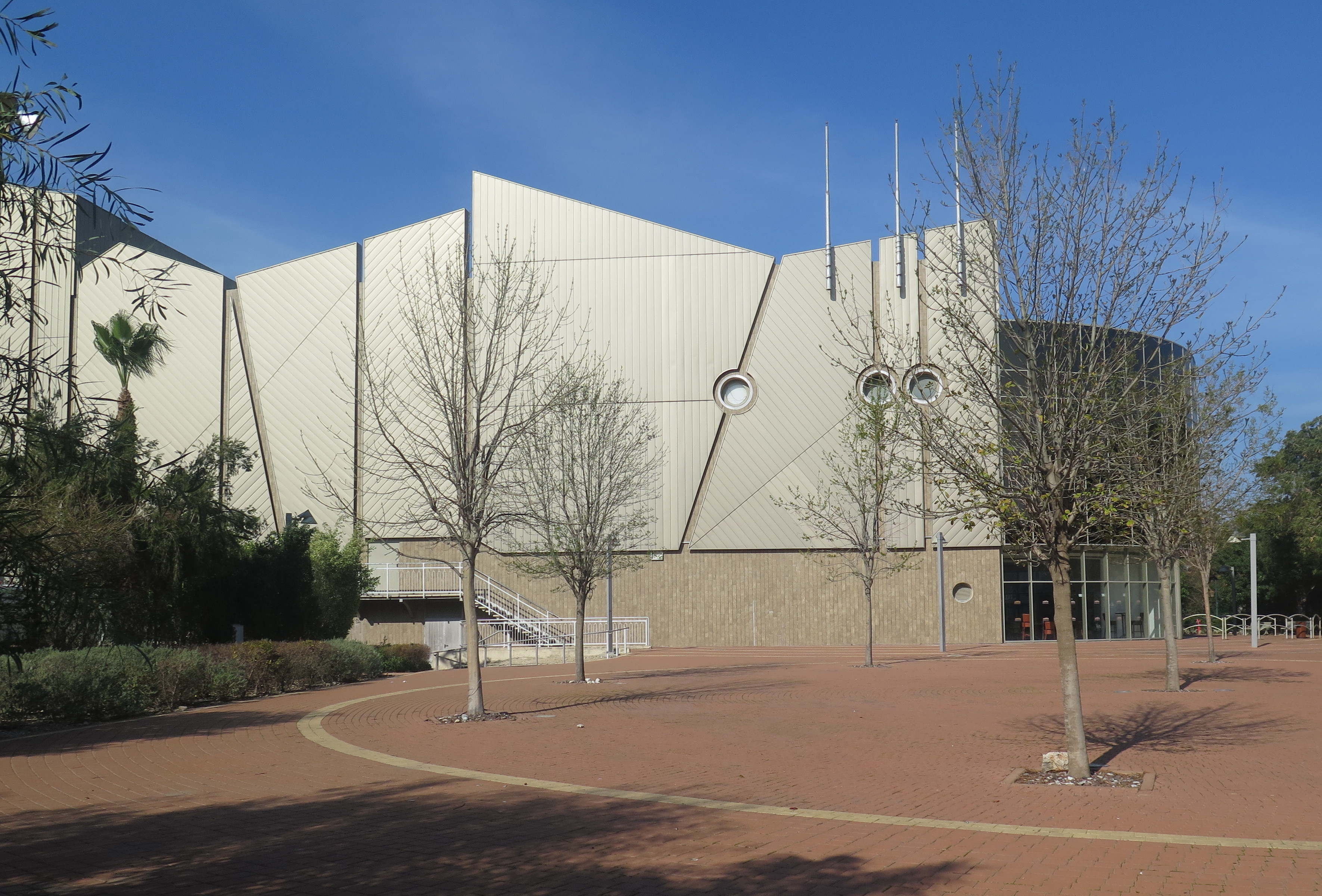 היכל התאטרון שנמצא קרית מוצקין